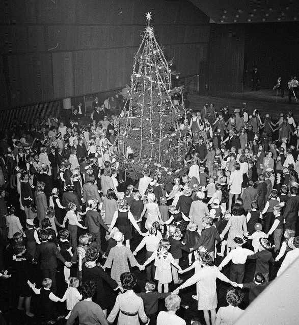 Oslo stein-, jord- og sementarbeideres forenings juletrefest i Folkets Hus i Oslo.